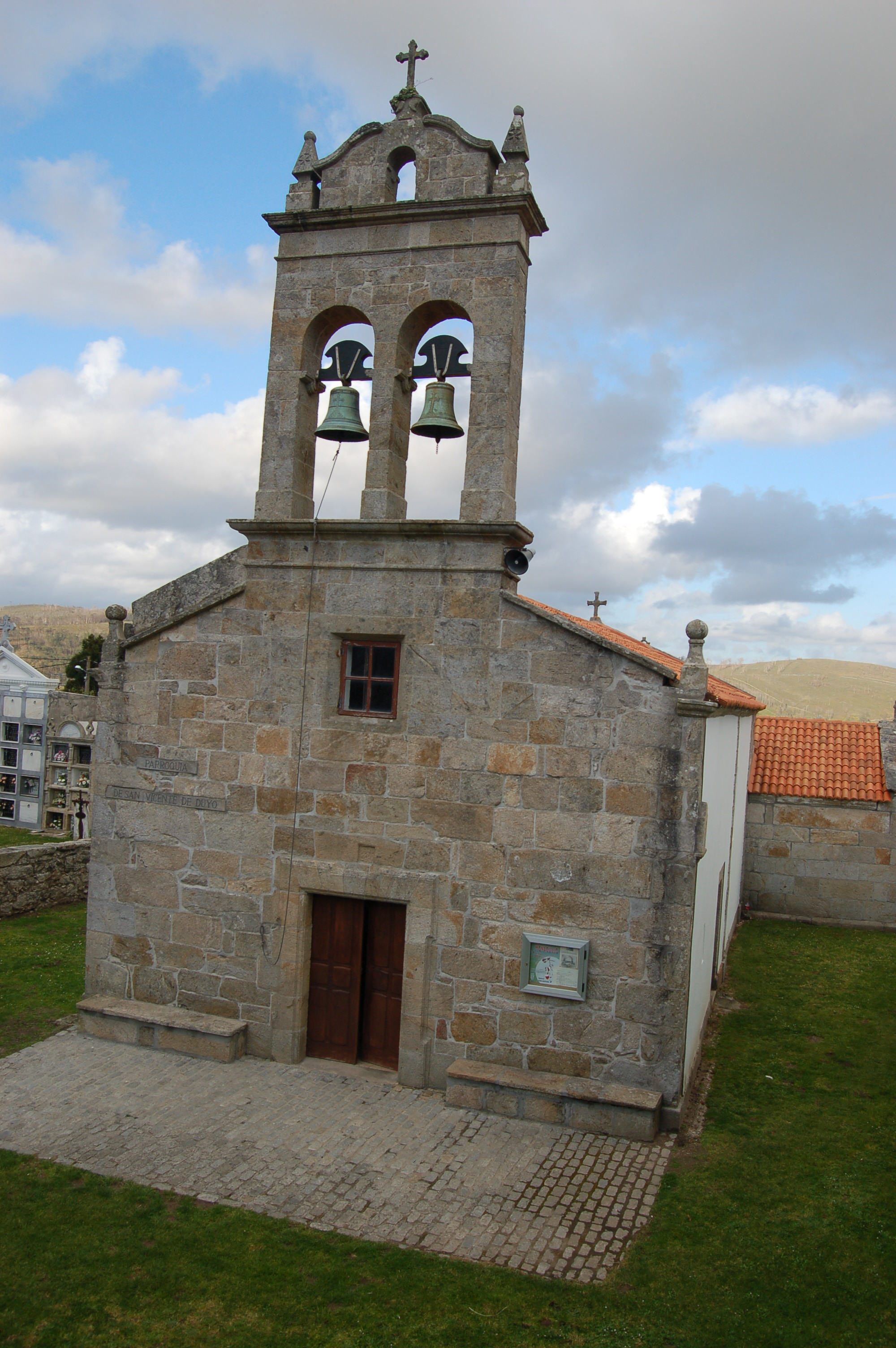 Igrexa parroquial de San Vicenzo de Duio (Fisterra).